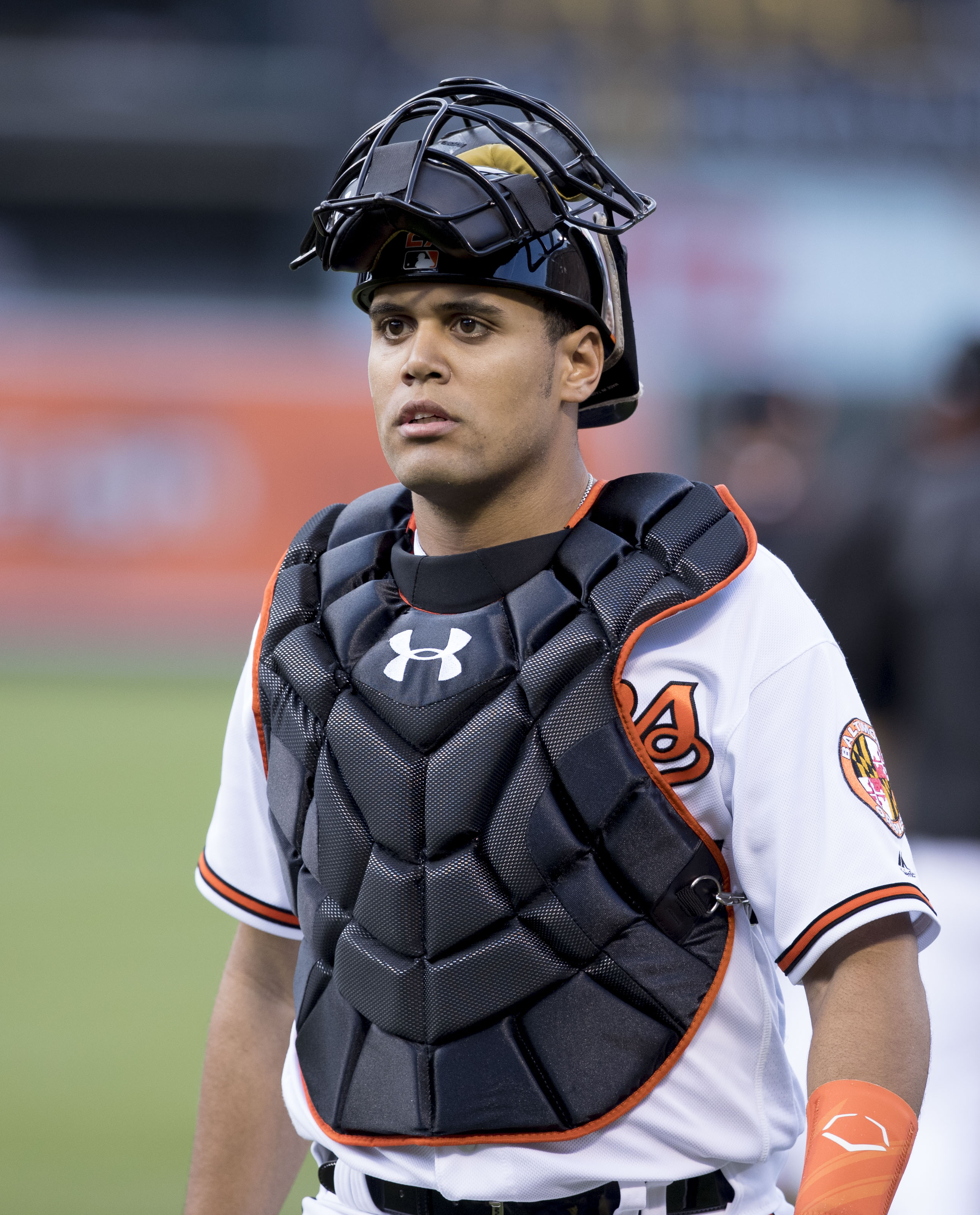 Francisco Peña